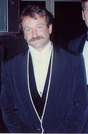 Ritaglio di File:Robin Williams (211172742).jpg